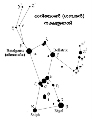 ബെയർ നാമകരണ സമ്പ്രദായം